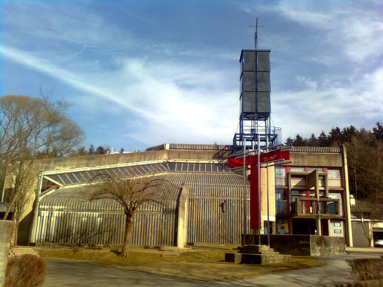 Maria Verkündigungskirche in Graz-Kroisbach im Bezirk Mariatrost. Das Kreuz wurde 1987 von Brigitte Haubenhofer-Salicites geschaffen.